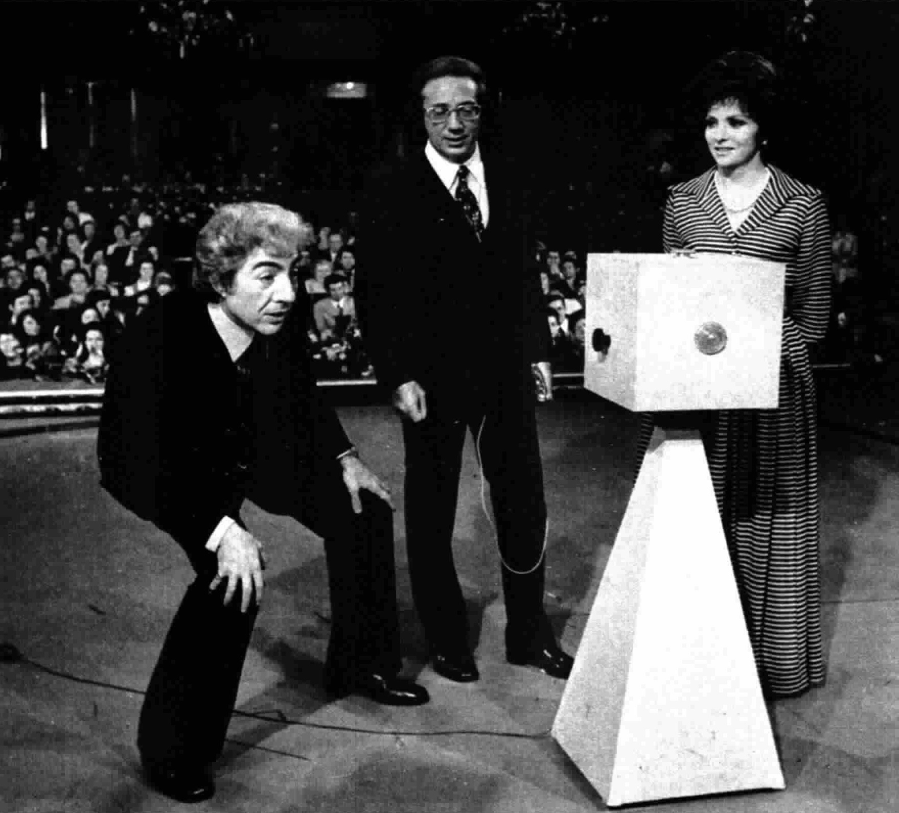 Italian actors Gino Bramieri, Mike Bongiorno and Gina Lollobrigida in the Italian TV program "Rischiatutto", Milan